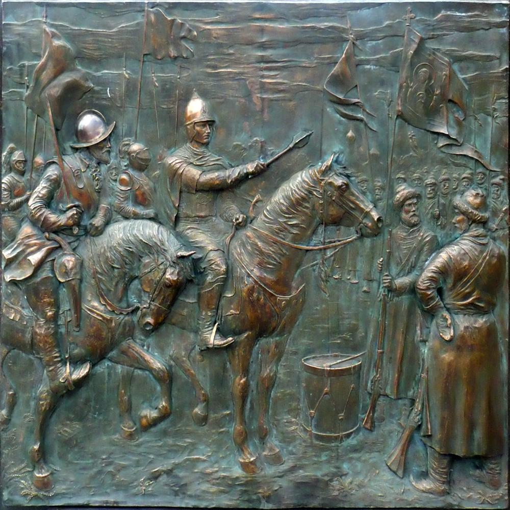 Барельеф со стелы «Город воинской славы» (Великий Новгород)»: 1609-1610 гг. Поход ополчения под началом М.В.Скопина-Шуйского на помощь осажденной Москве